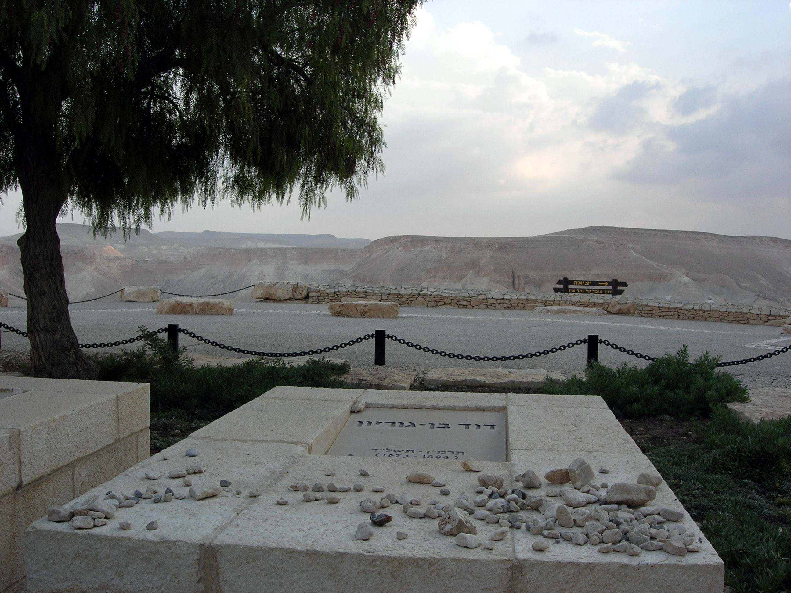 Description =Tombe de David Ben Gourion dans le kibboutz de Sdé Boker, dans le désert du Néguev. Source =Photo taken by Remi Jouan Date =Novembre 2005 Author =Remi Jouan